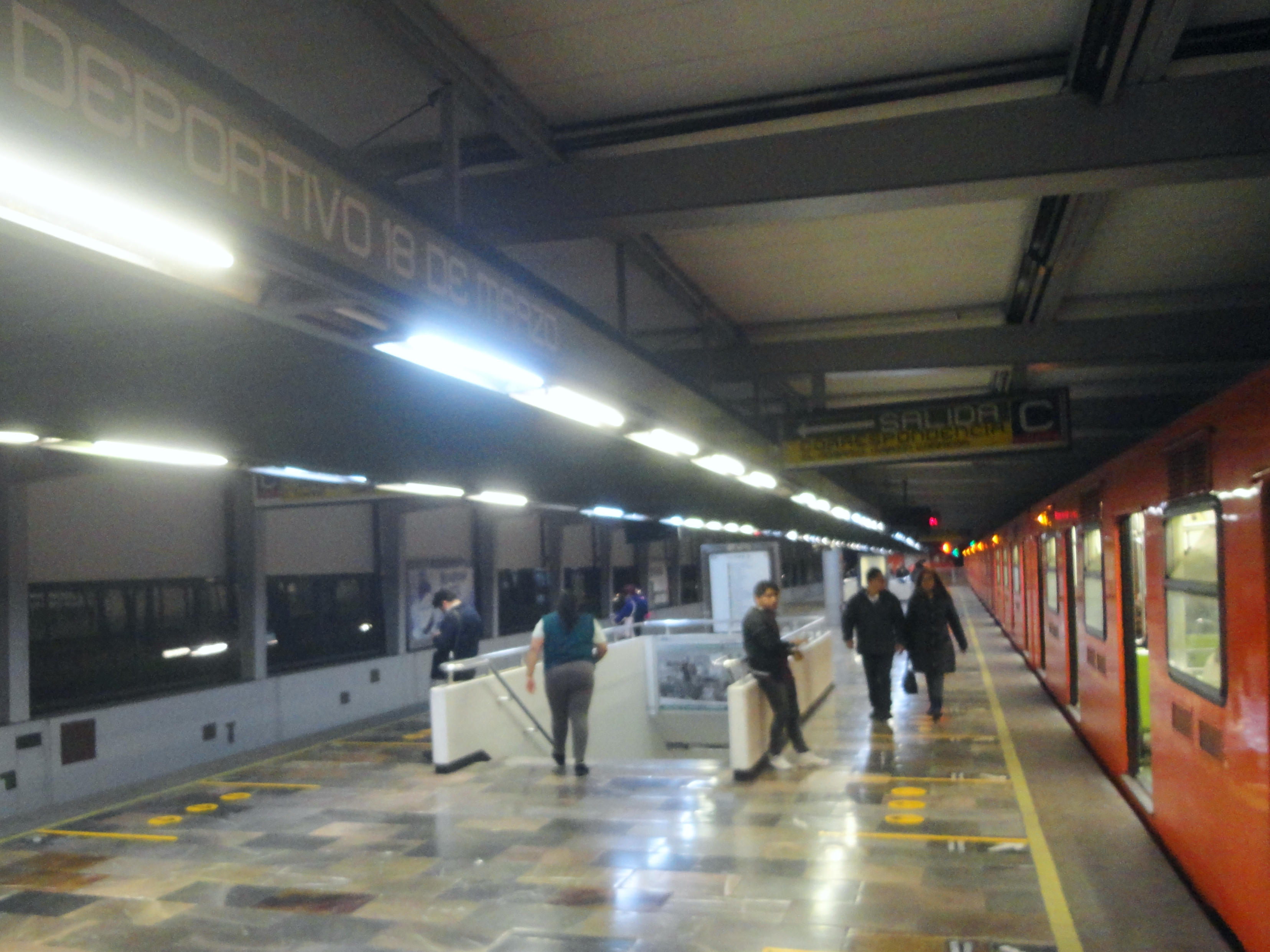 Estación Deportivo 18 de Marzo - Línea 3 - Metro de la Ciudad de México